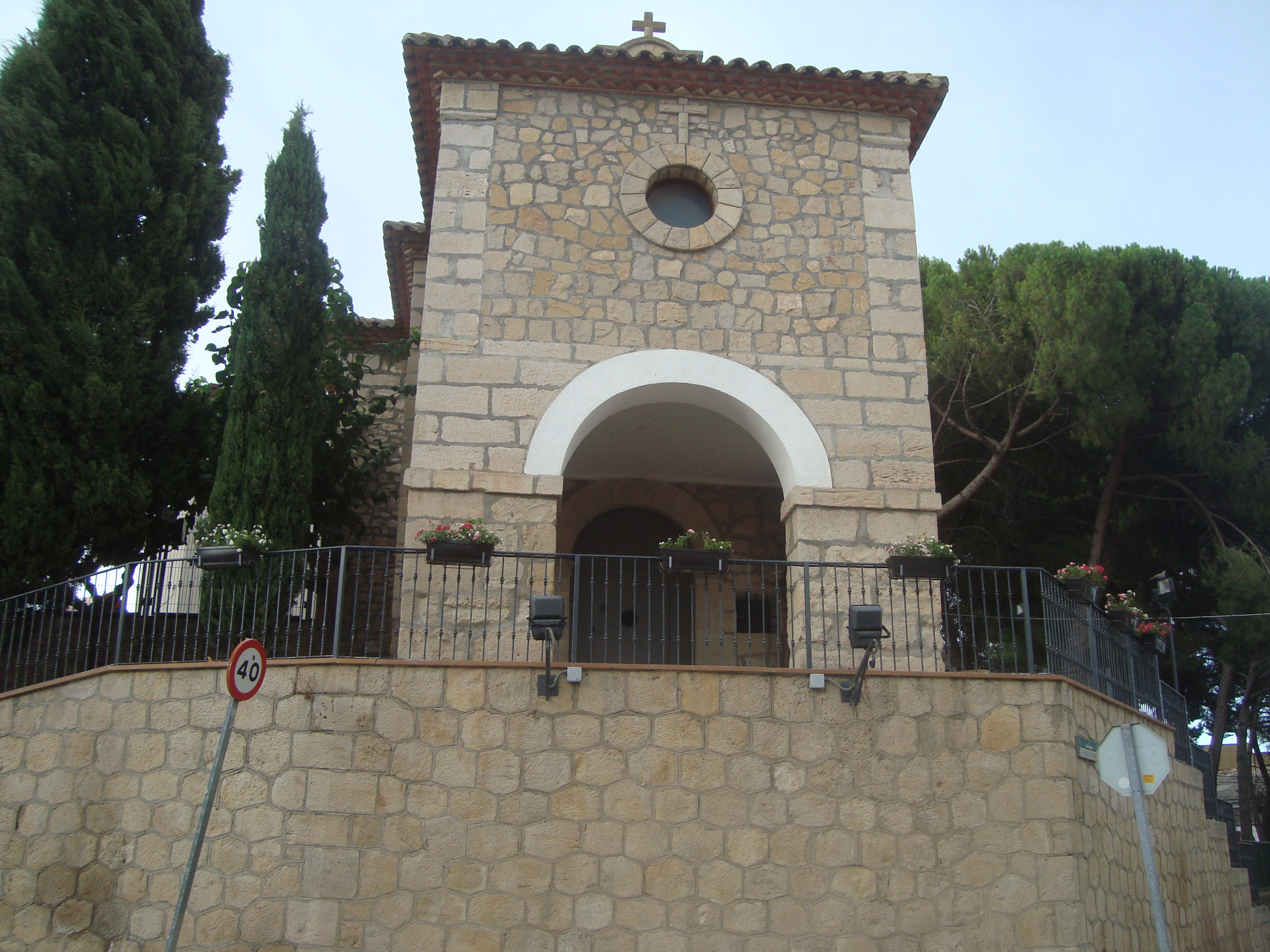 Ermita de Sant Miquel patró dels ecologistes (Ascó)